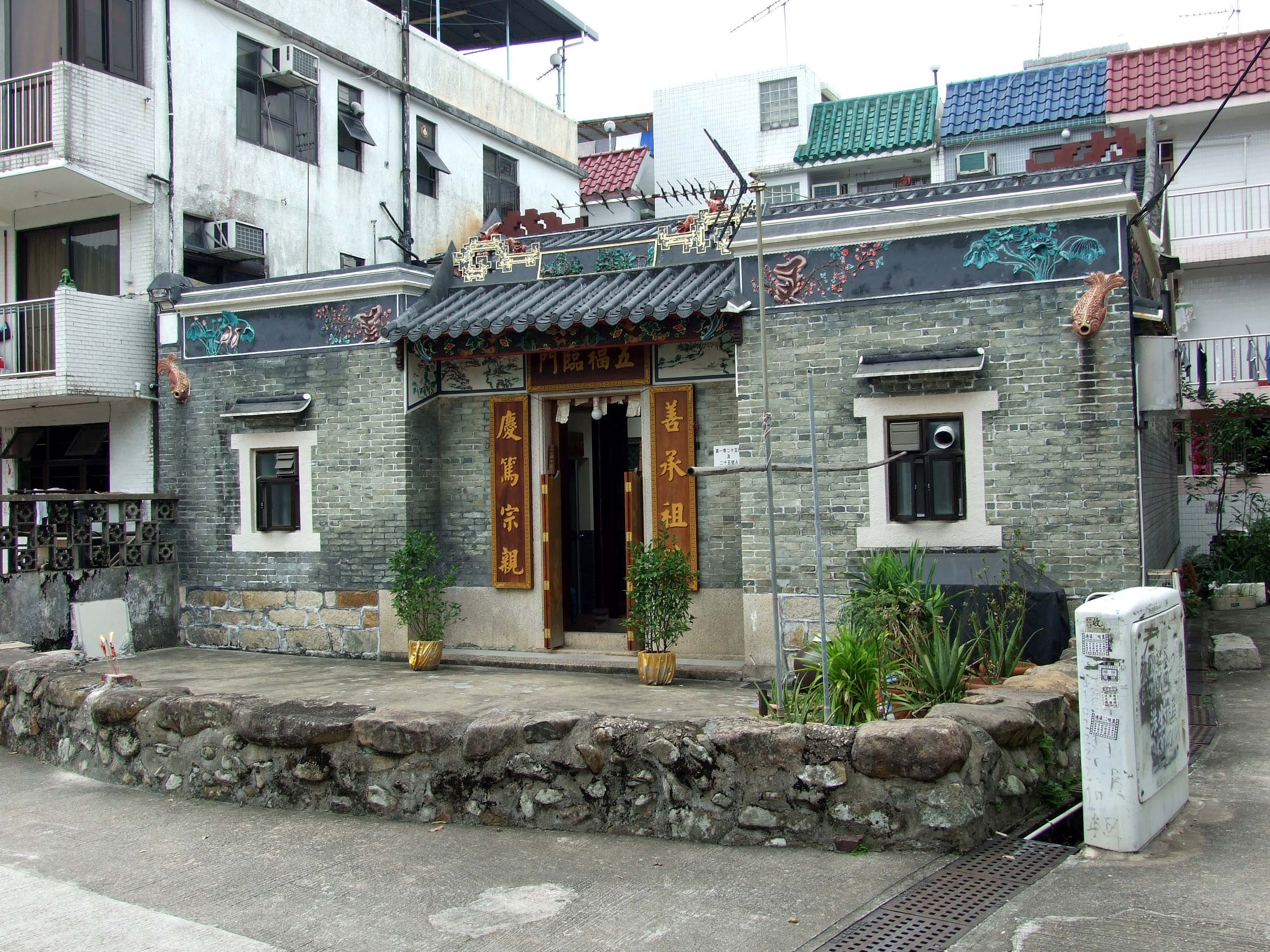 中文（香港）: 蠔涌陳氏家祠